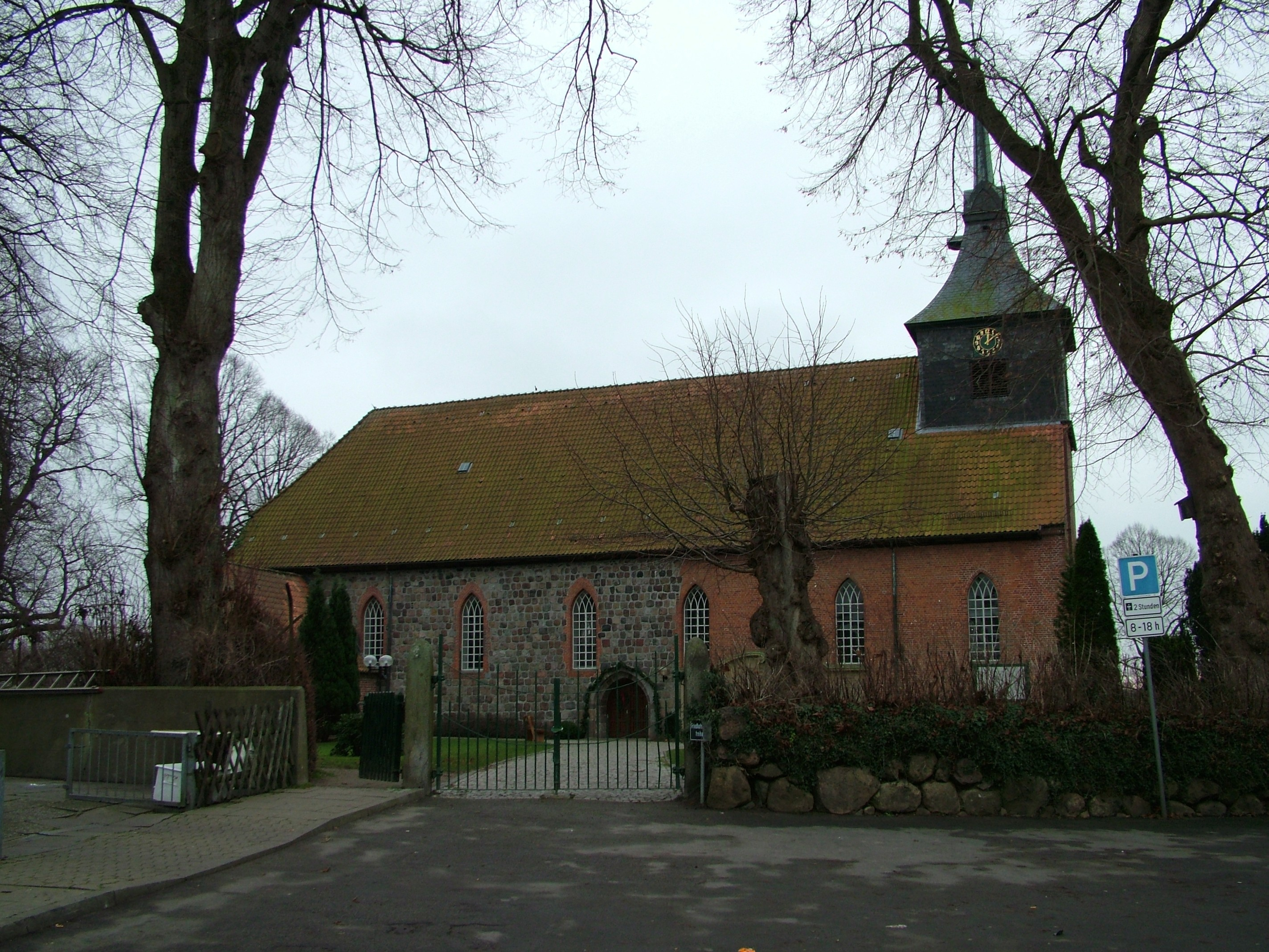 Dänischenhagen, Schleswig-Holstein, die Kirche